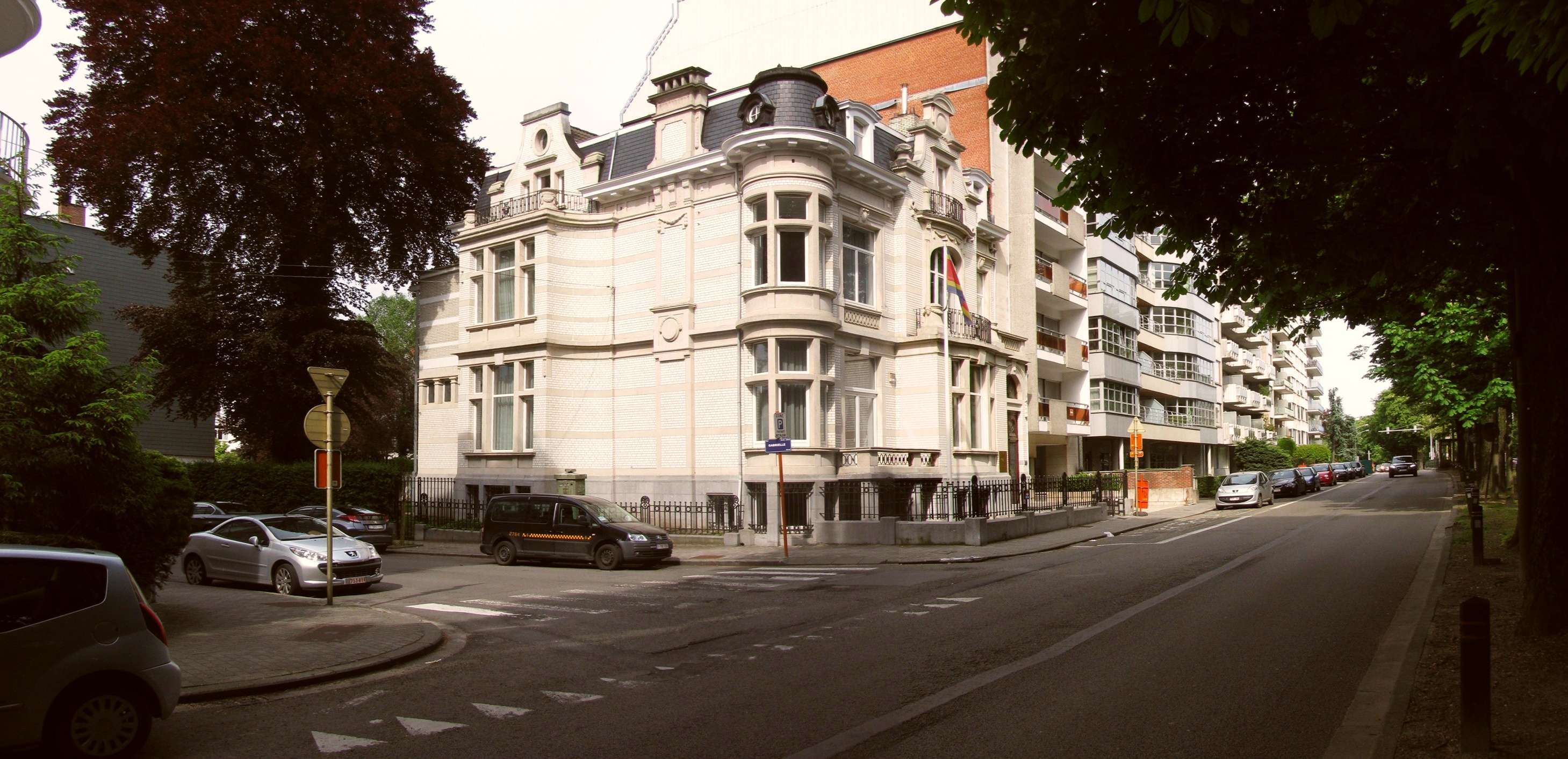 Uccle, av. Churchill, angle rue Gabrielle, Hôtel de maître par Paul Picquet